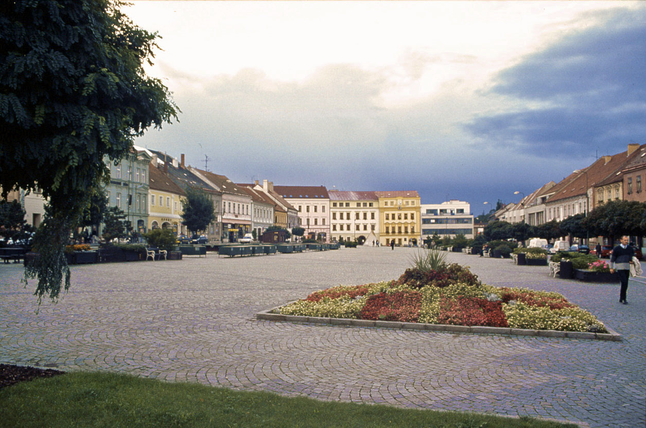 Karlovo náměstí (Carl's Square)